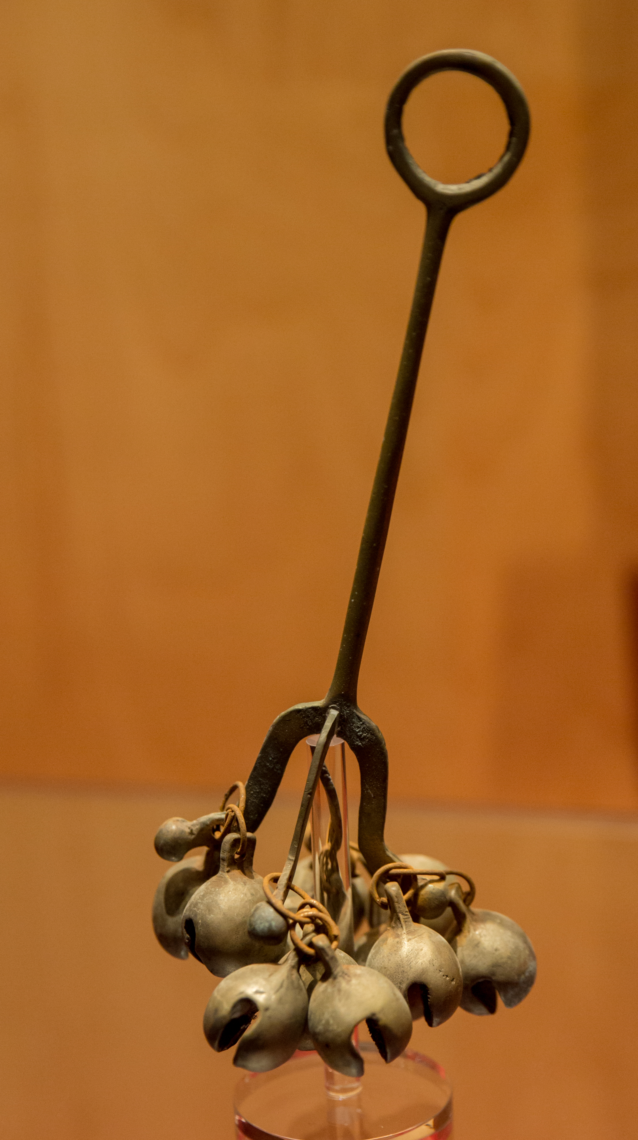 Bangul, exposat a Eolssigu! Els sons de Corea